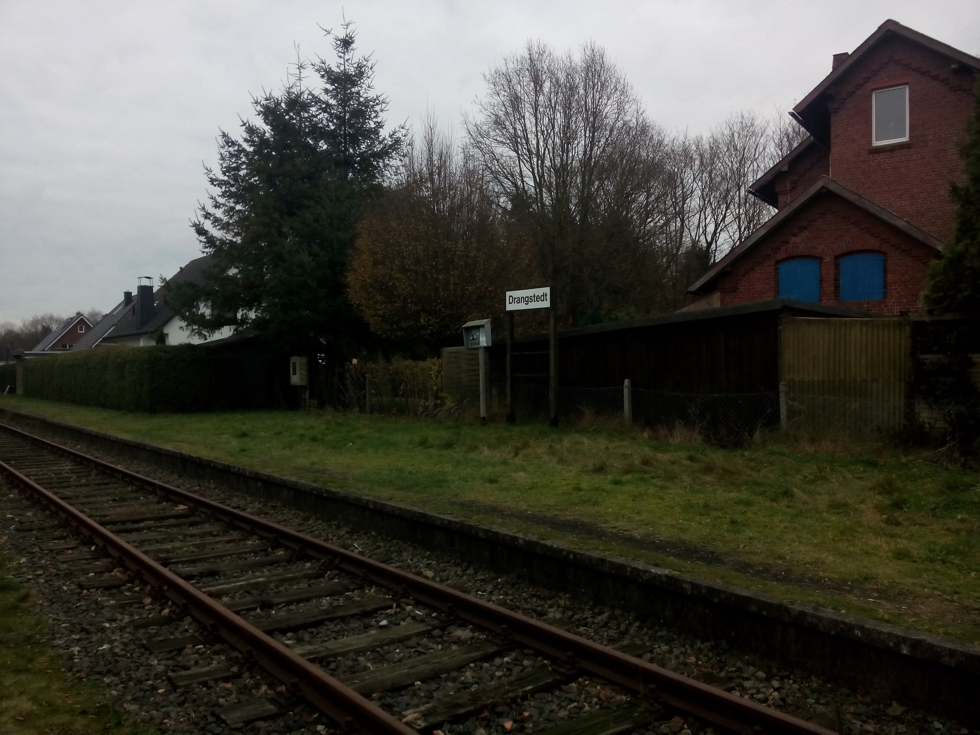 Bahnhofsschild des Bahnhof Drangstedt, CUX. Blick Richtung Bederkesa